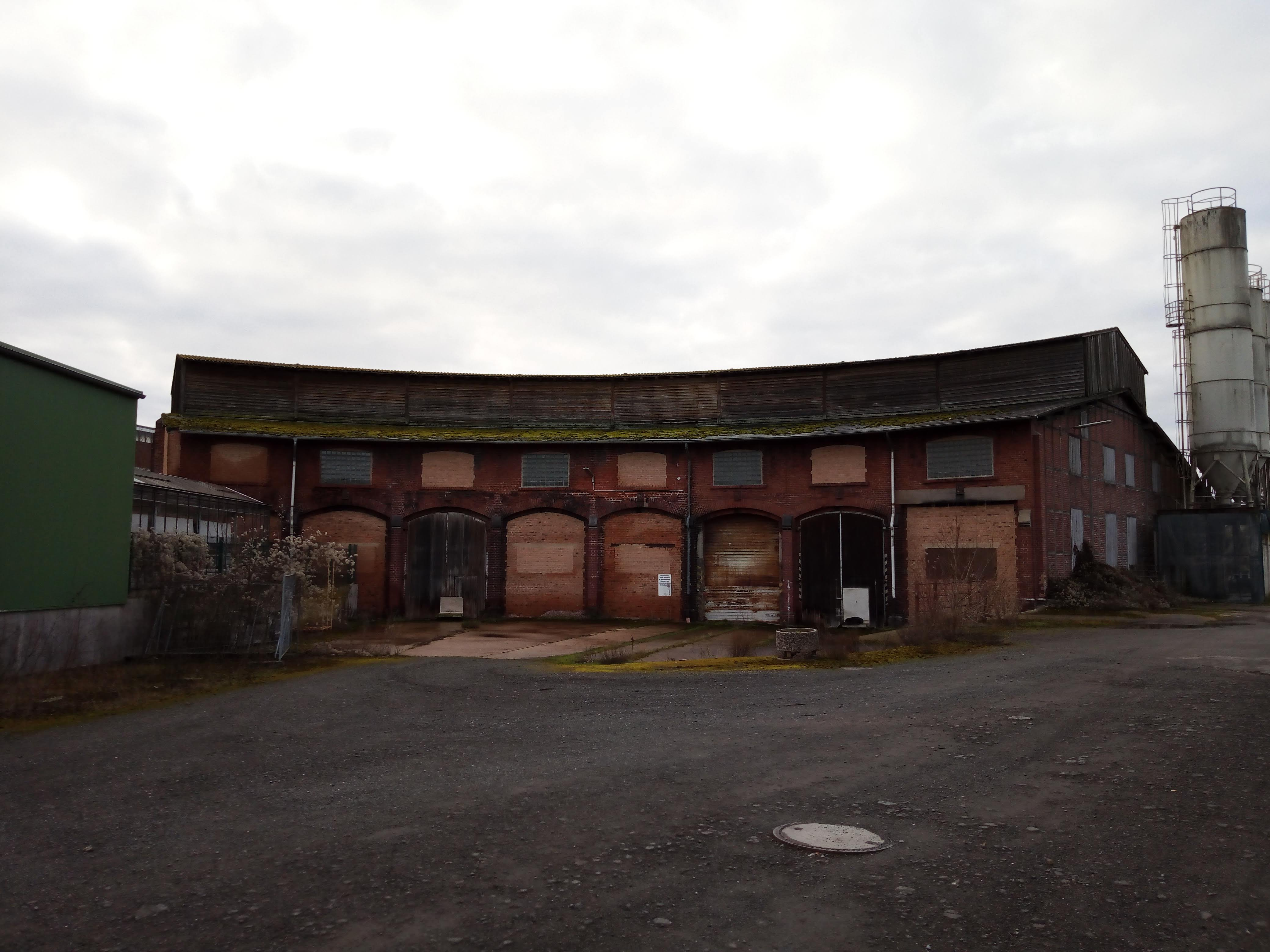 Ehemaliges Bahnbetriebswerk Warburg, Lokschuppen